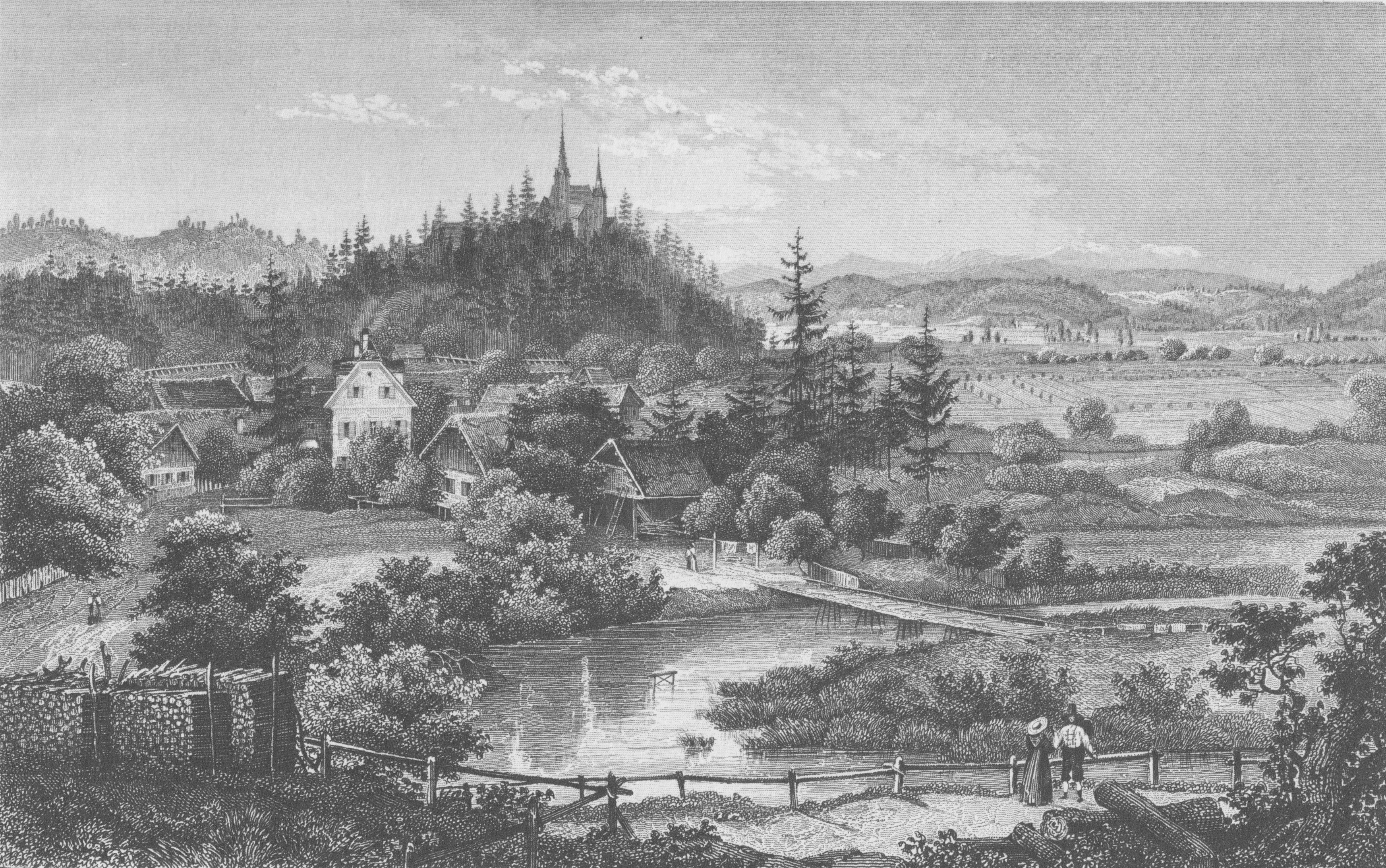 Straßengel.